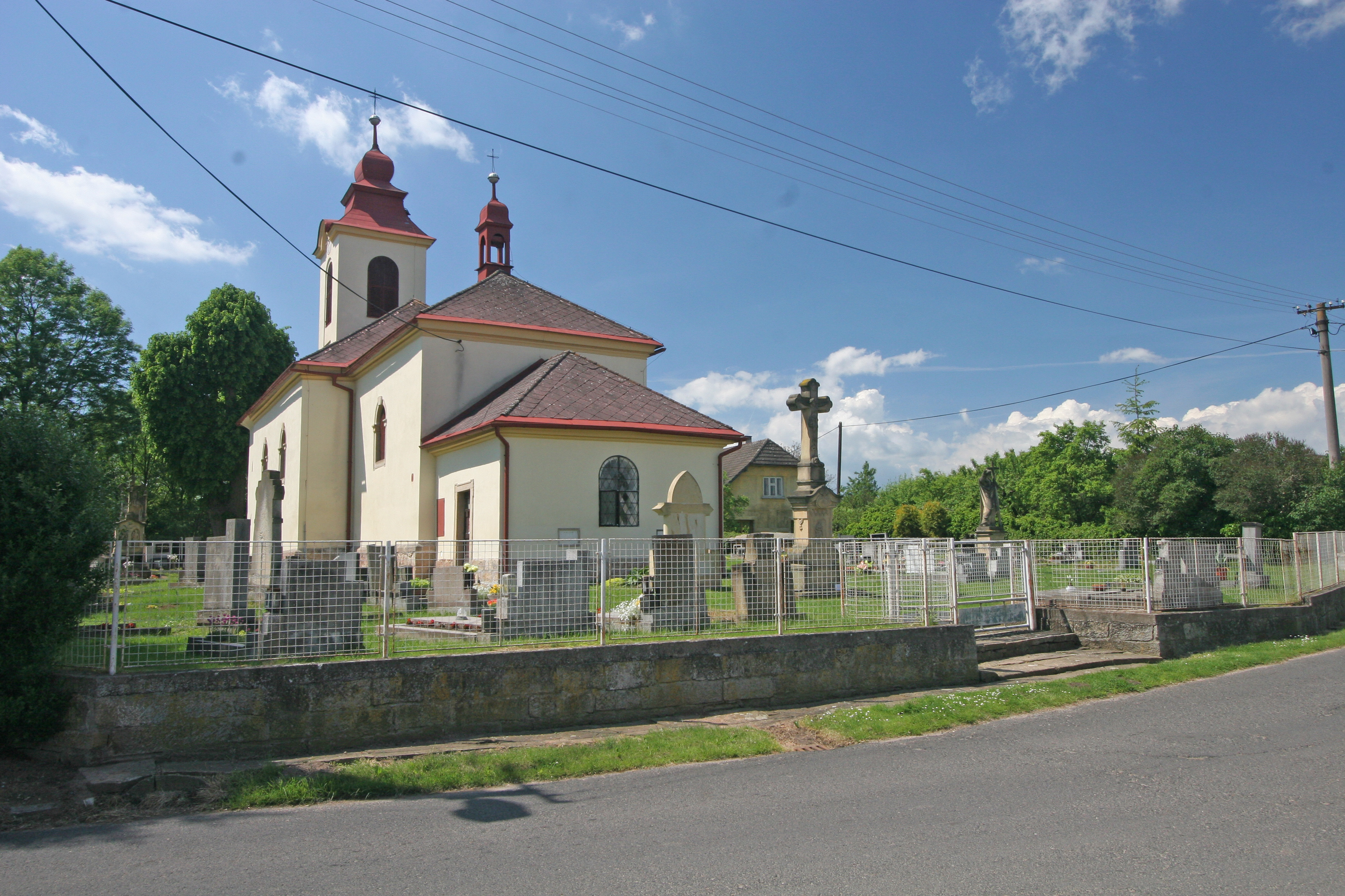 Kostel sv. Mikuláše (Choteč), Choteč Church of Saint Nicholas (Choteč)